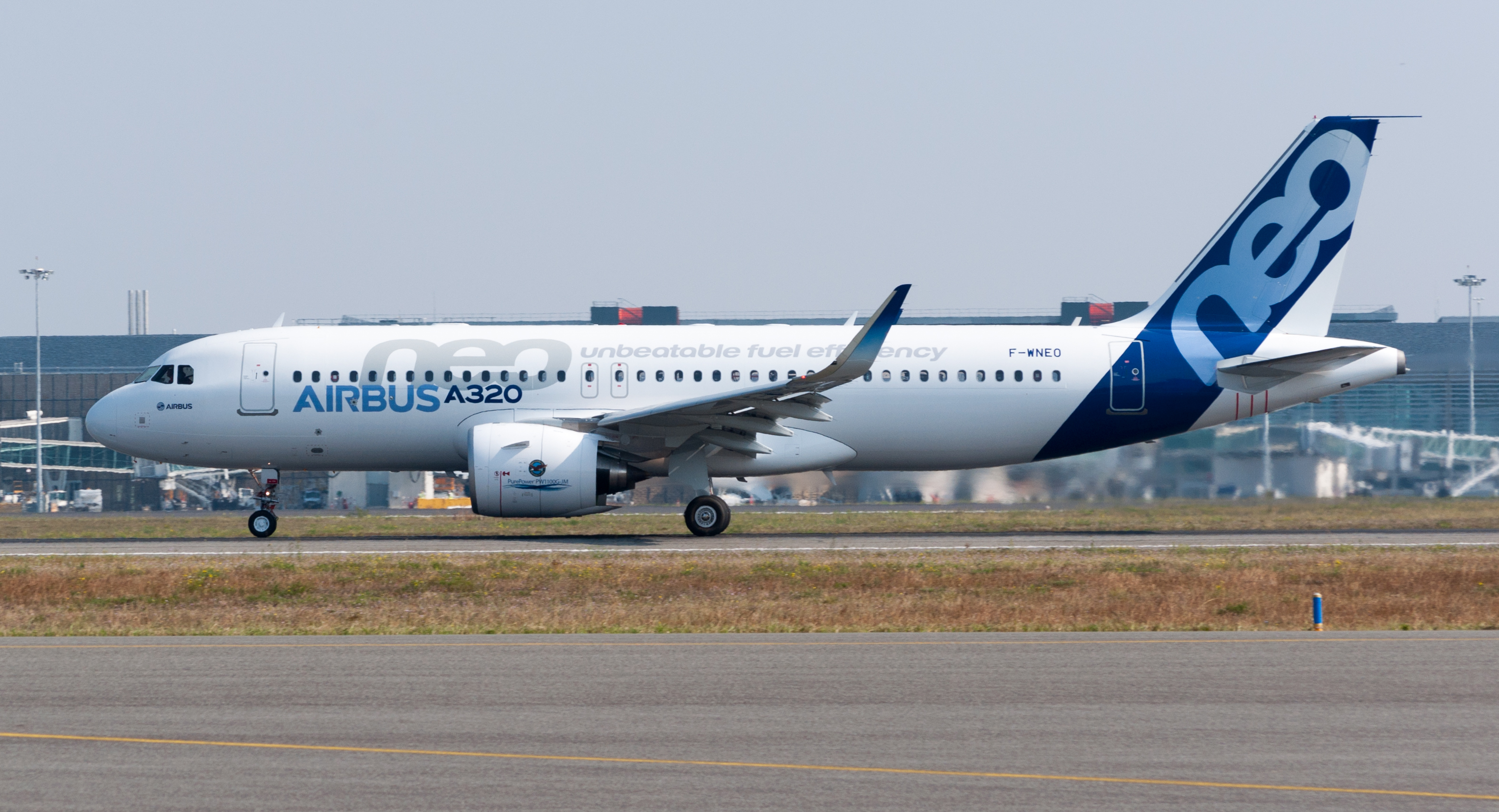 Premier vol de l'A320neo depuis le site Airbus; aéroport international Toulouse Blagnac.